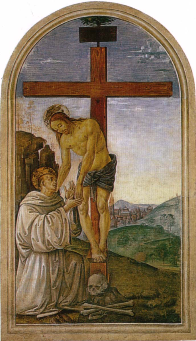 PERUGINO, Pietro Saint Bernard and the Crucifix Fresco, 247x145 cm S. Maria Maddalena dei Pazzi, Florence